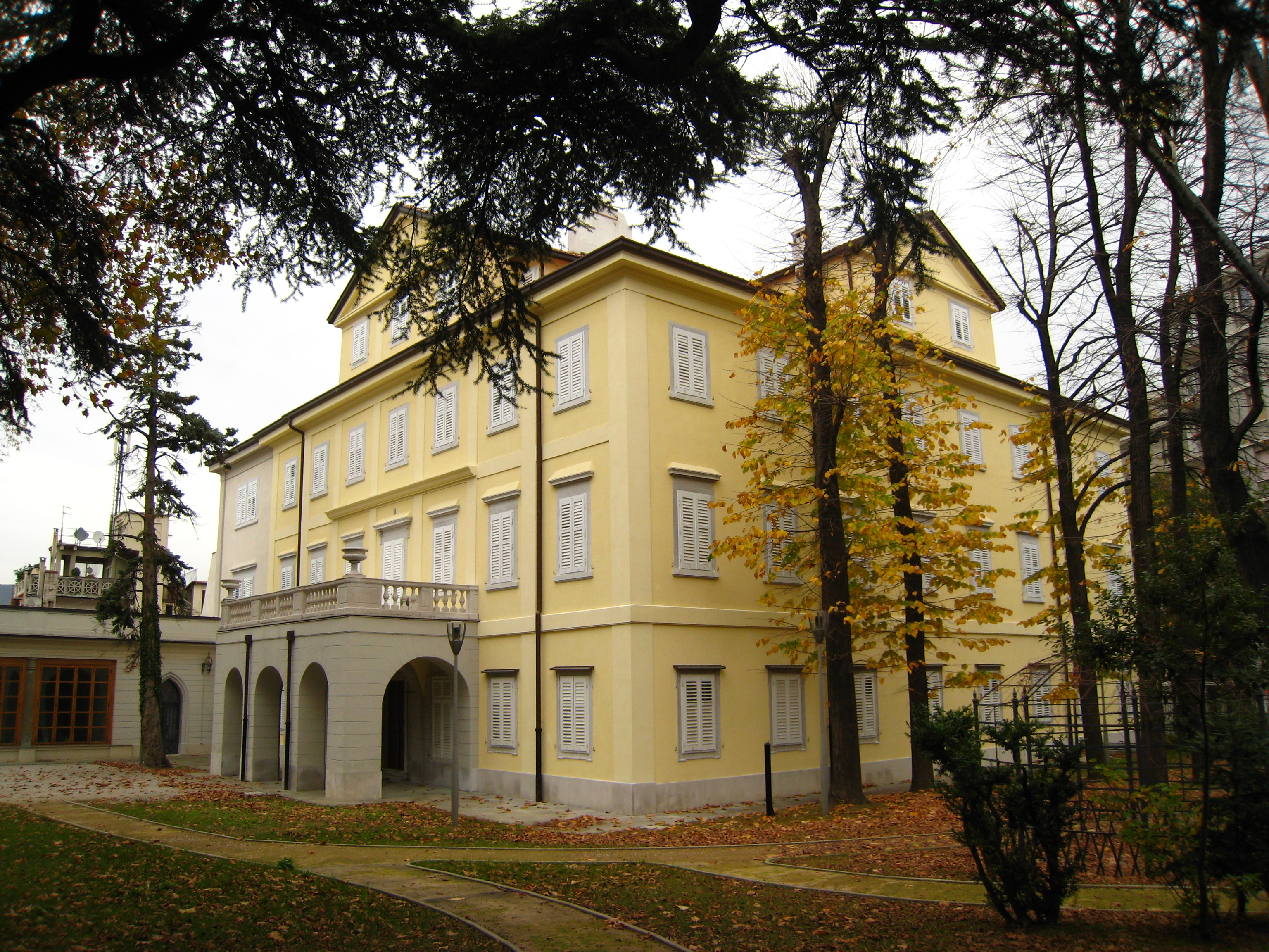 Trieste - Museo Sartorio 4-11-2008